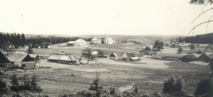 Bärnkopf, Waldviertel, Niederösterreich, Austria